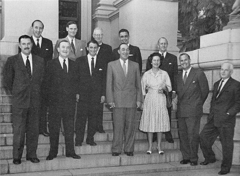 Die parlementêre koukus van die Progressiewe Party in 1960 op die trappe voor die parlement afgeneem. Voor: Walter Stanford, Harry Lawrence, Boris Wilson, Jan Steytler, Helen Suzman, Colin Eglin, Owen Williams. Agter: Ray Swart, Clive van Ryneveld, John Cope, Zach de Beer, Ronald Butcher.